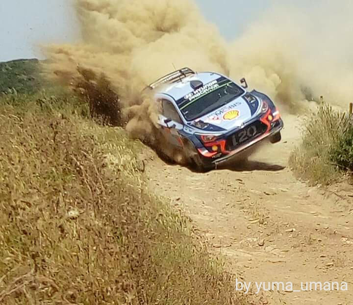 Neuville wrc rally di sardegna 2018 ultima tappa in cui recuperò un decimo su Ogier per vincere il rally.